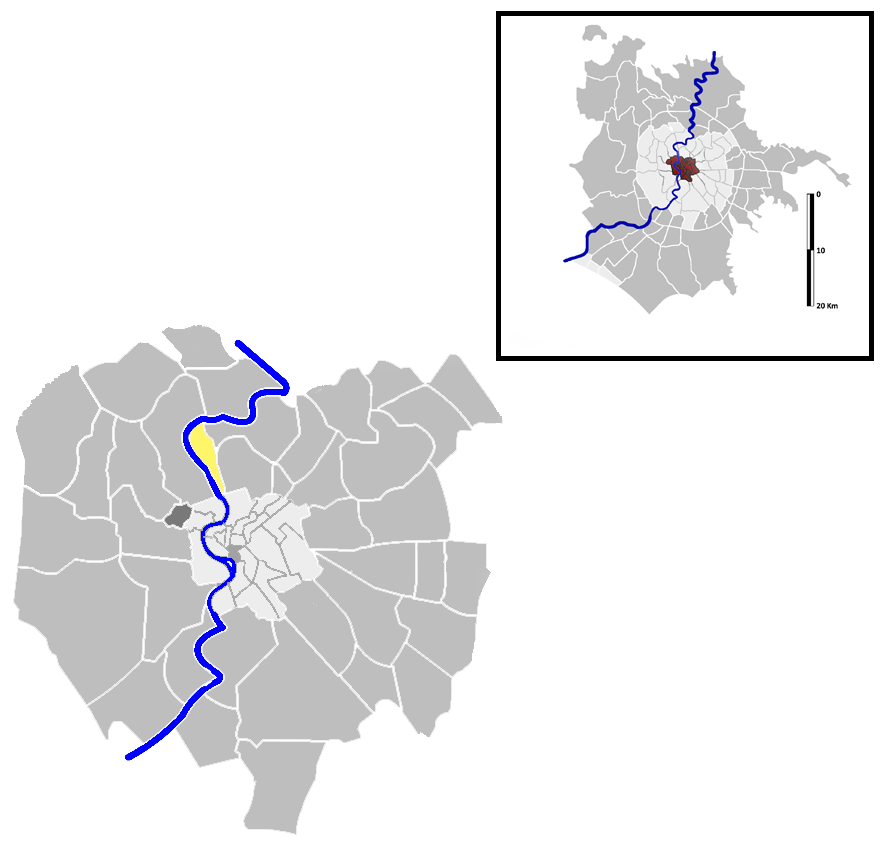 Flaminio